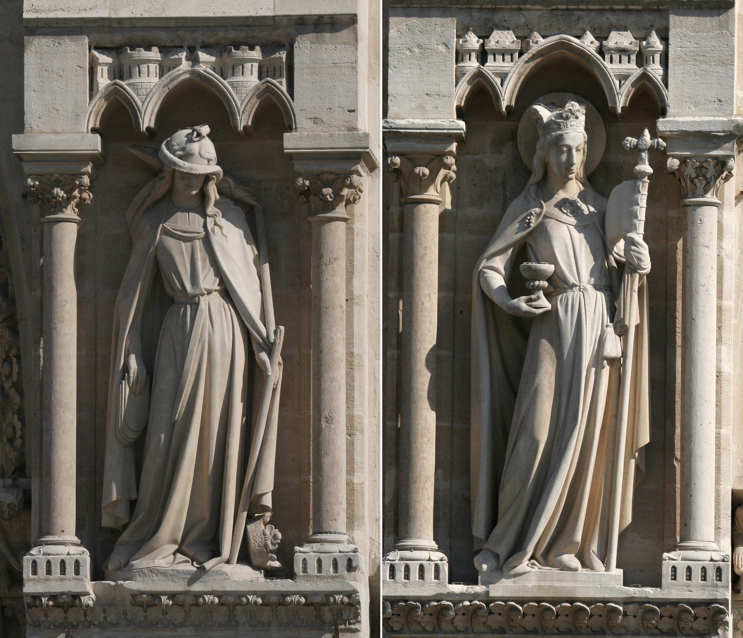 האקלזיה והסינגוגה - הכנסייה ובית הכנסת מקתדרלת נוטרדאם, מימין לשמאל